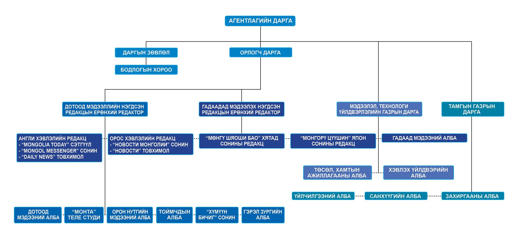 Монгол: МОНЦАМЭ агентлагийн бүтэц